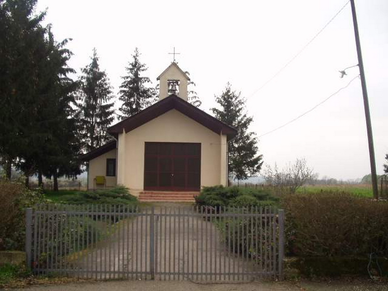 Negovec - Kapelica